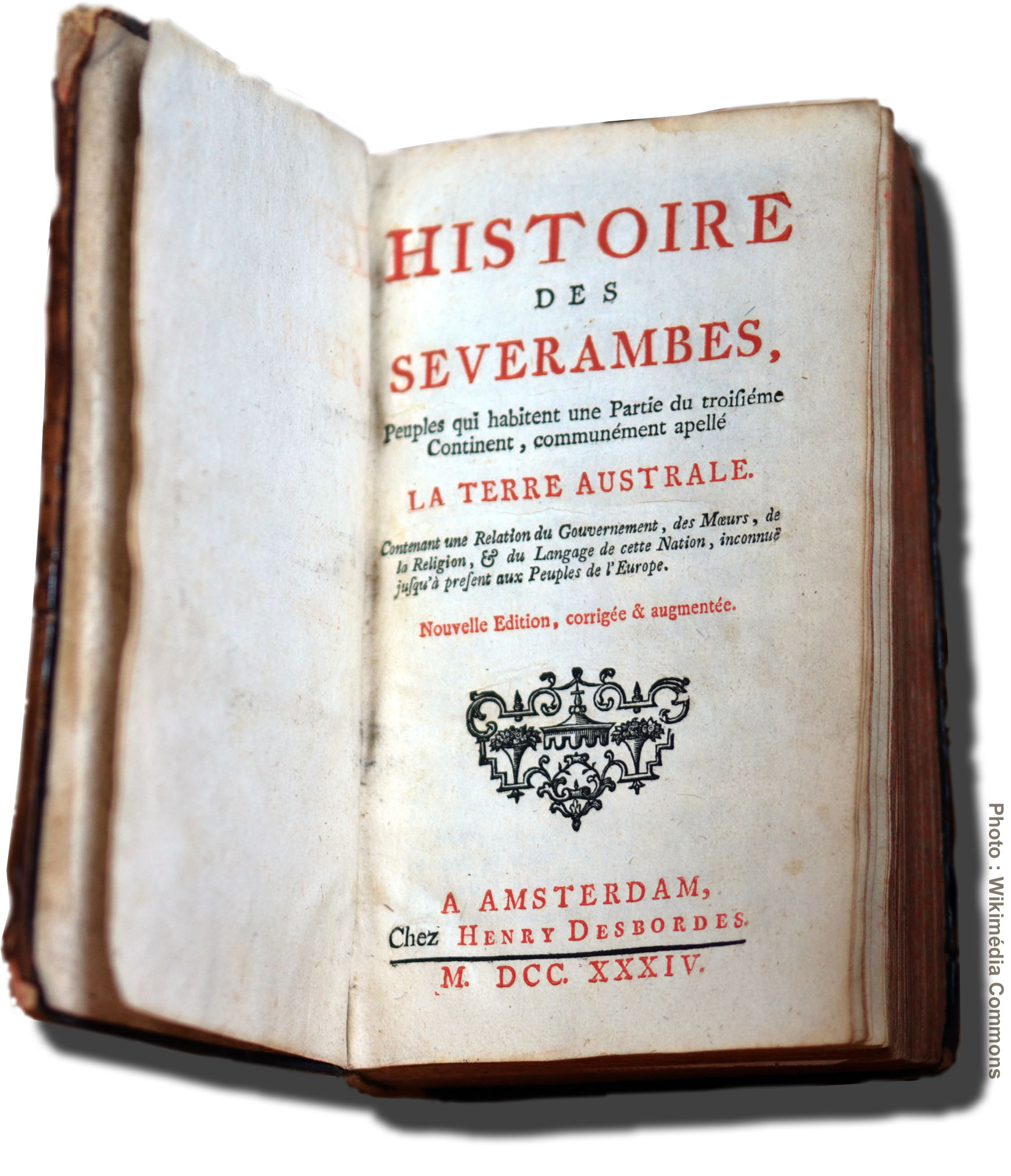 Histoire des Sevarambes, Peuples qui habitent une partie du troisième continent, communément appelé La terre australe, contenant une relation du Gouvernement, des moeurs, de la religion & du langage de cette nation, inconnue jusqu'à présent aux peuples de l'Europe, une utopie romancée qui intègre l'hypothèse de l'existence de" Terres Australes" non découvertes dans l'océan Indien au sud-est du cap de Bonne-Espérance. Le texte (première partie) est présenté comme un ouvrage historique ou géographique de l'époque, comme si les lieux et personnages existaient vraiment. "Nouvelle édition, corrigée & augmentée par l'éditeur Henry Desbordes à Amsterdam en 1734.